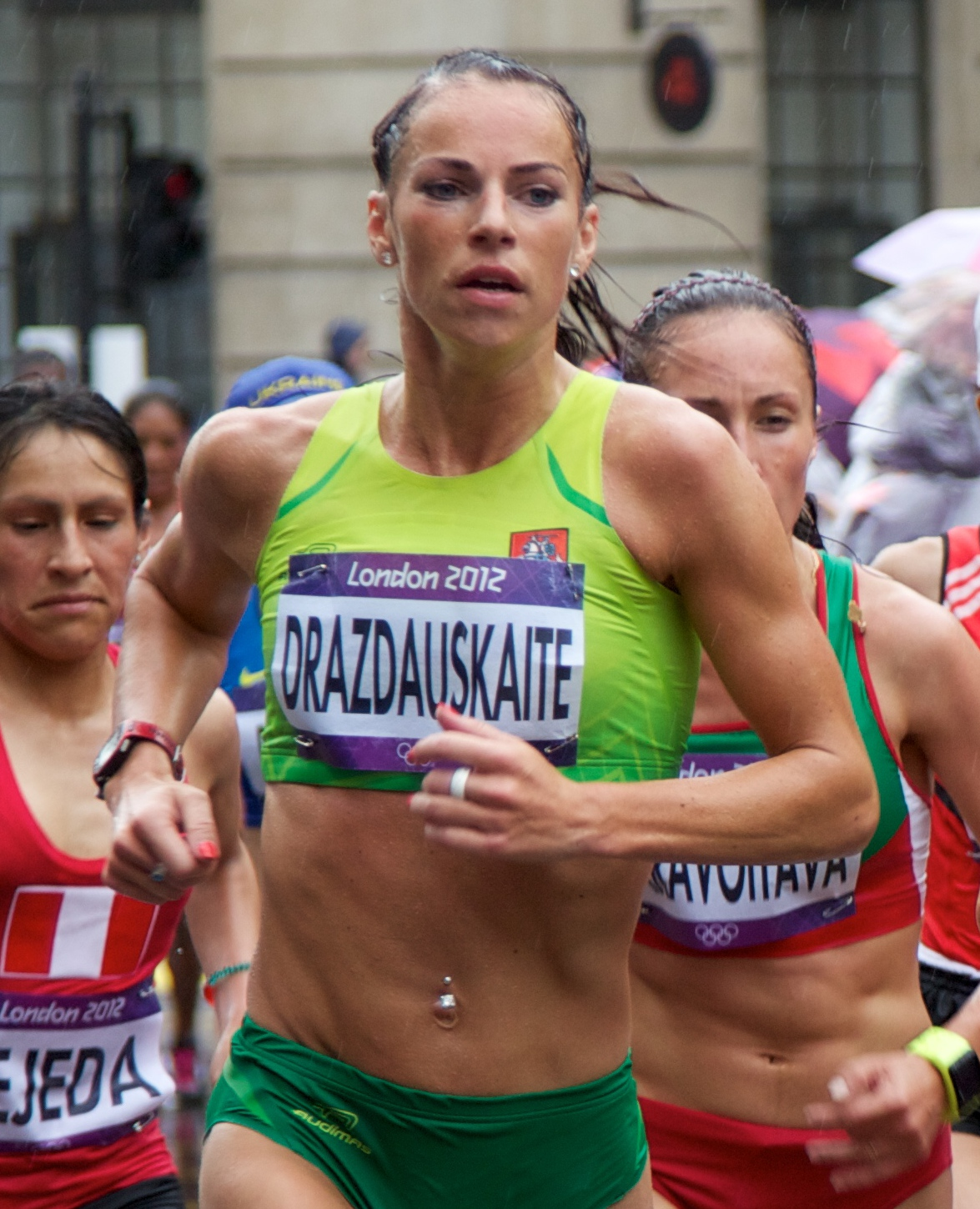 Women's Marathon, Gladys Tejeda (Peru), Rasa Drazdauskaite (Lithuania), Nastassia Staravoitava (Belarus), Sviatlana Kouhan (Belarus), Ummu Kiraz (Turkey)